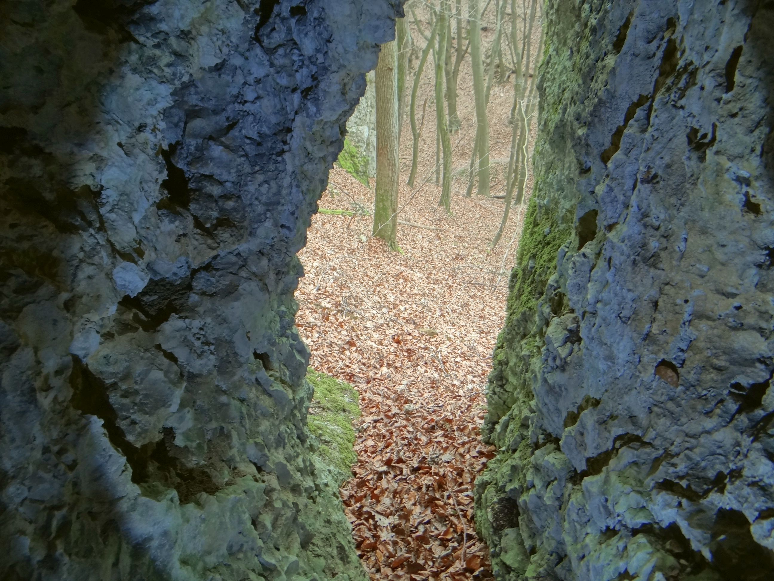 Szczelina w Środku Doliny (w Dolinie Kobylańskiej)